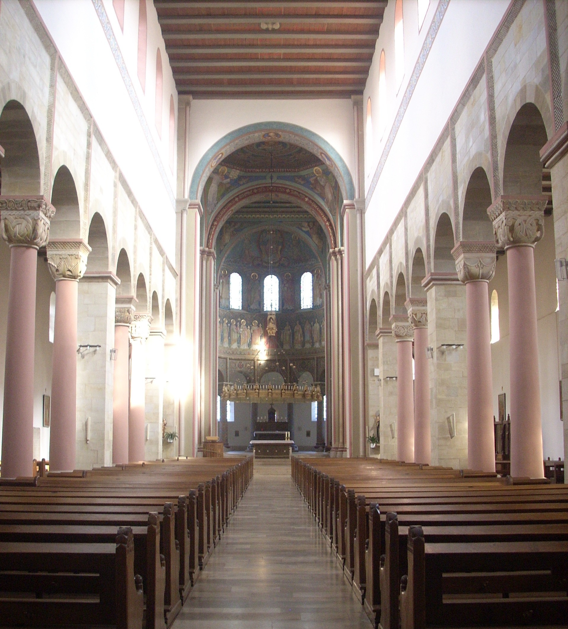 Hildesheim, Basilika St. Godehard, Langhaus nach Osten